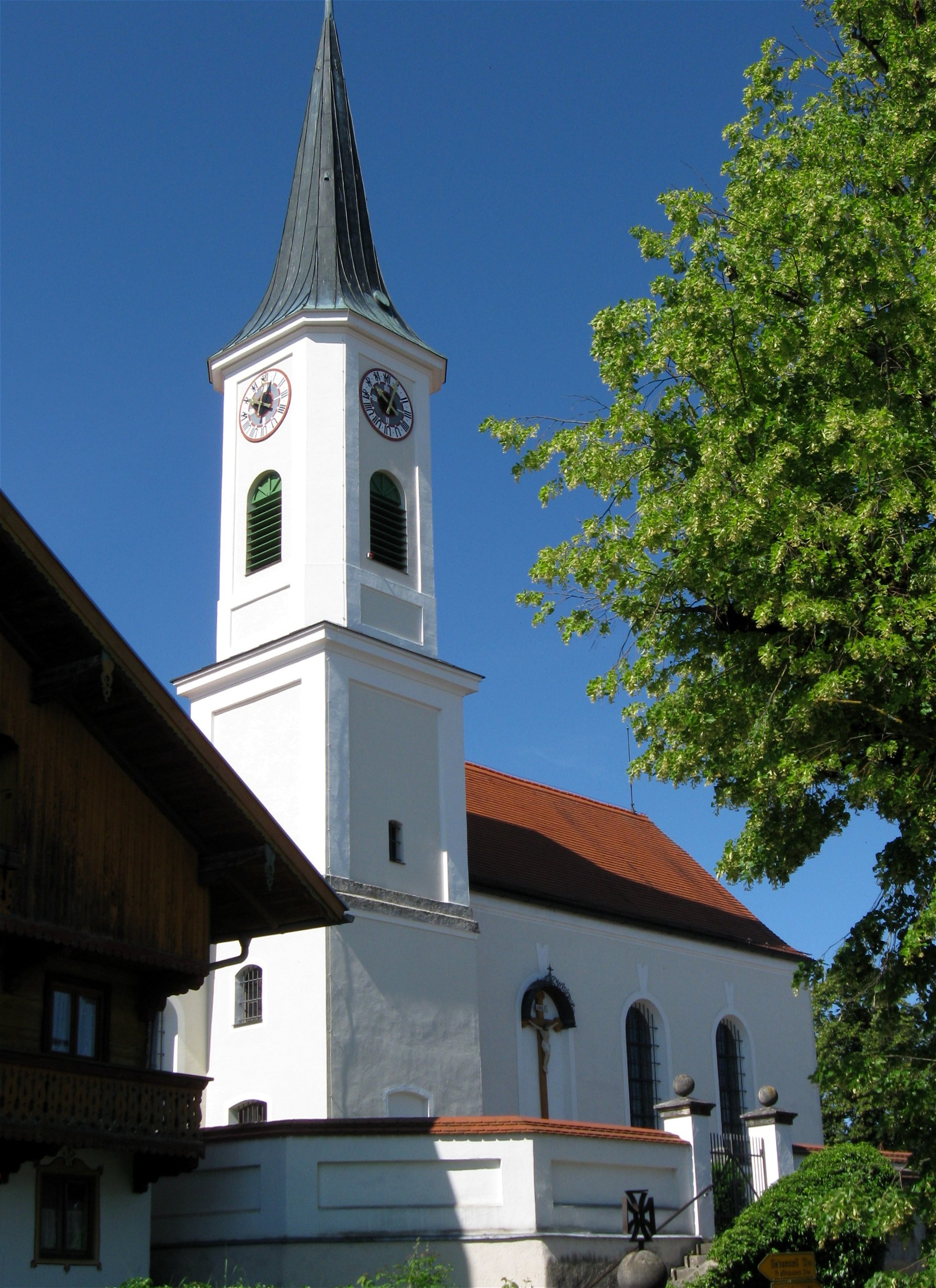 Endlhausen, Wolfratshauser Straße 1; Kath. Pfarrkirche St. Valentin; erbaut 1756; mit Ausstattung.